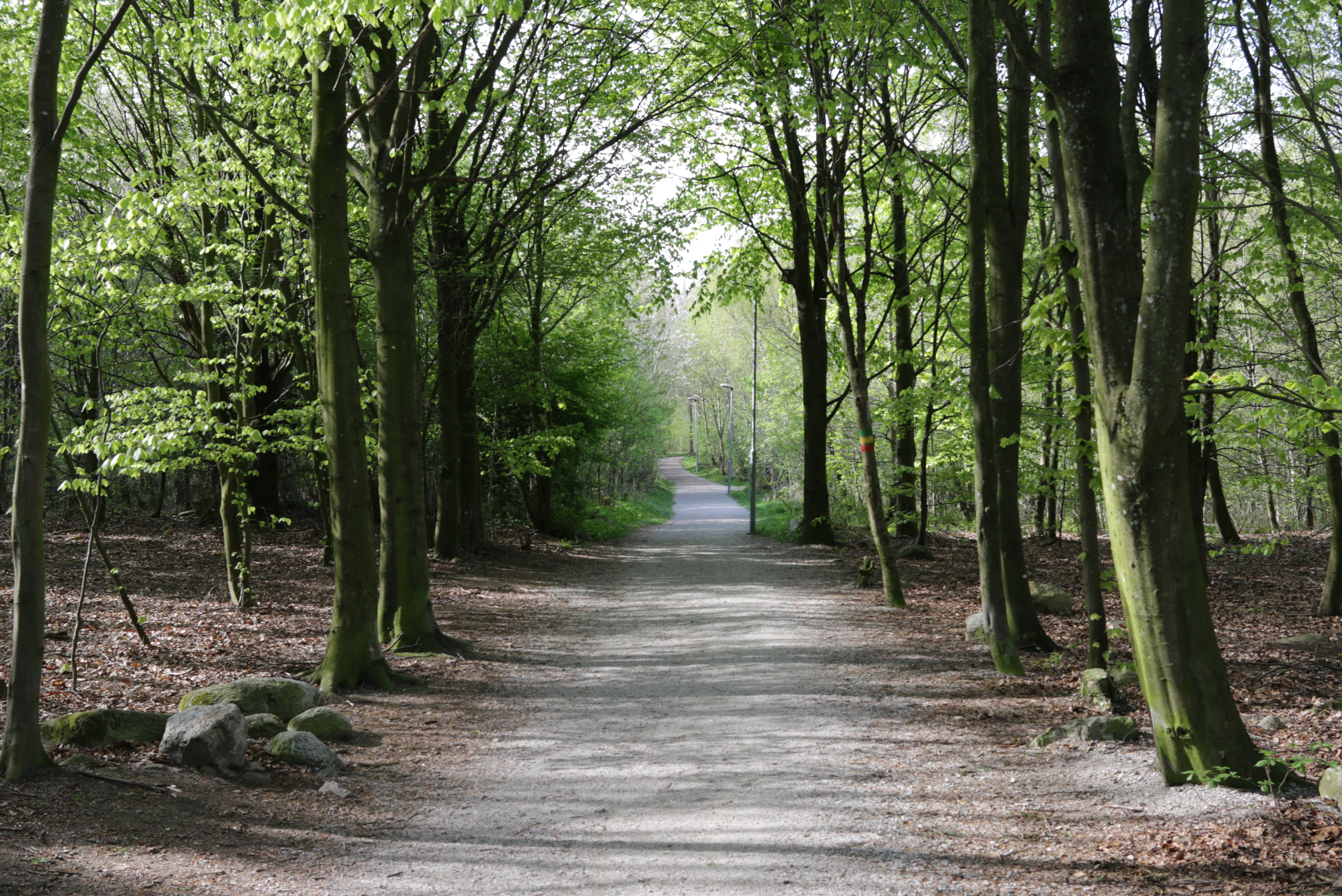 Skryllegården